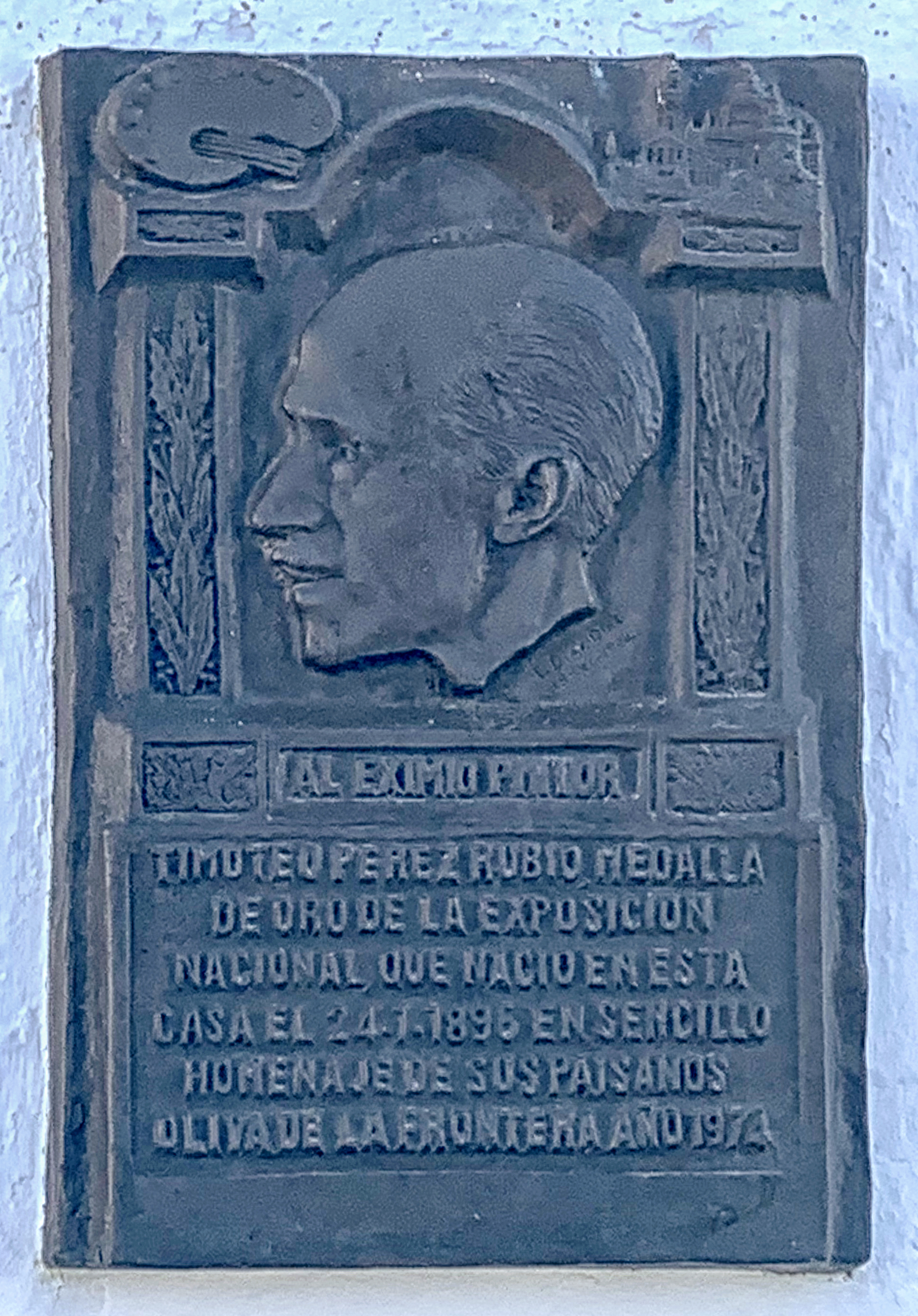 Oliva de la Frontera (Badajoz). Placa conmemorativa del lugar de nacimiento de Timoteo Pérez Rubio en la fachada de la denominada "Casa del Ermitaño", situada a escasos metros del santuario de Nuestra Señora de Gracia, patrona de la localidad, descubierta el 24 de noviembre de 1974.